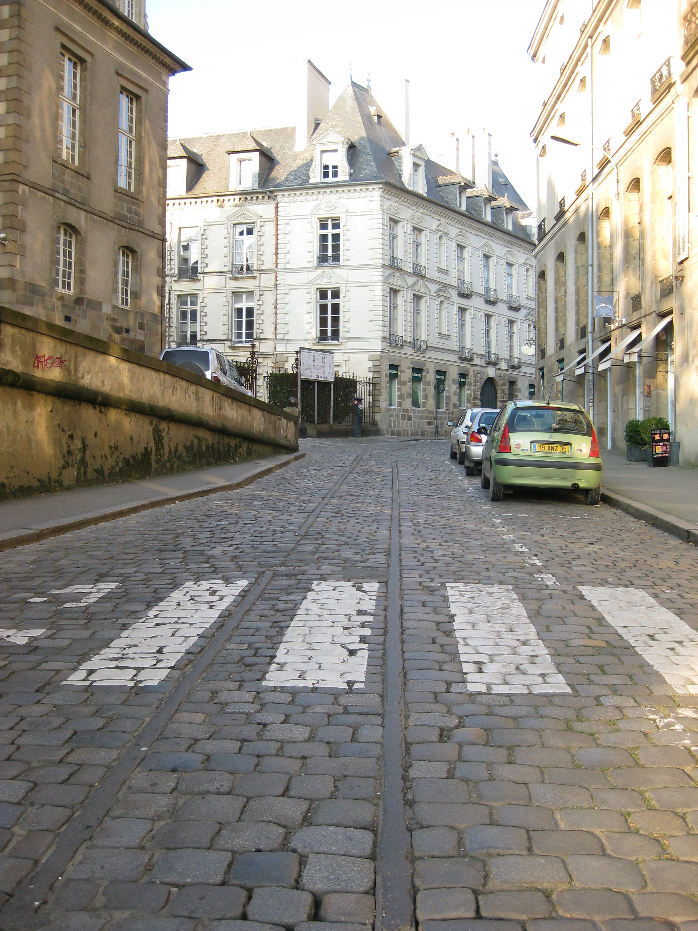 Vestiges du tramway ligne 4, rue de la Monnaie à Rennes, photographiés en décembre 2008. Direction Cimetière de l'Est.